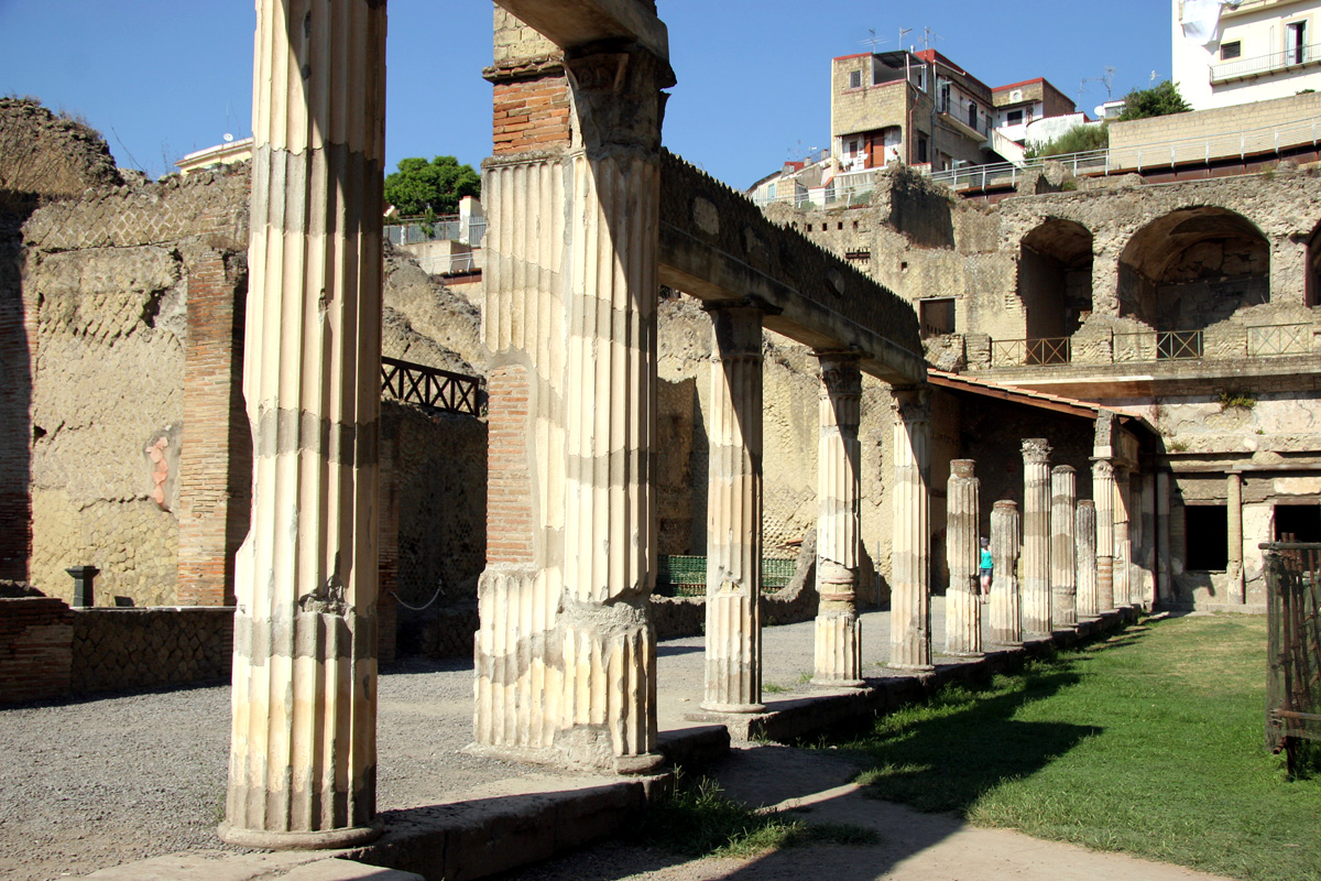 La Palestra, Herculano.